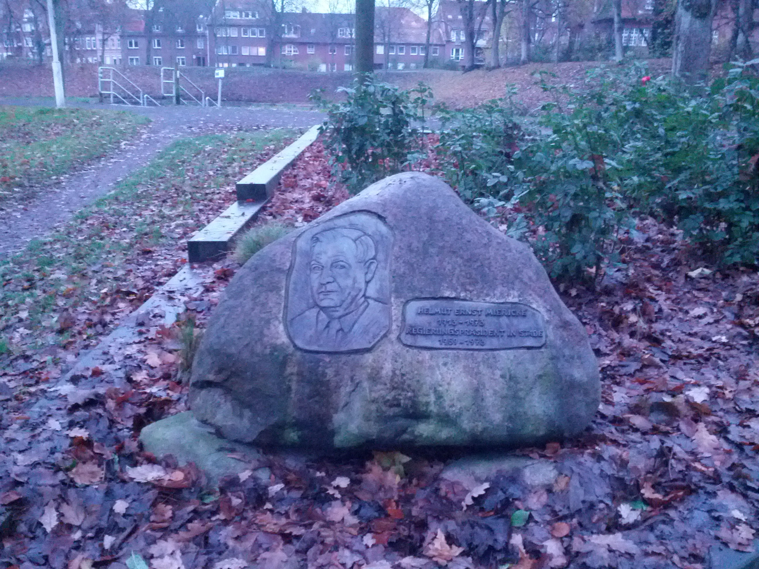 Gedenksteen för Helmut Ernst Miericke in Stood